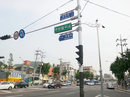 부평사거리. 경인로가 남북으로 지나며, S자 형태로 서북쪽으로 마장로, 동남쪽으로 만월로가 각각 시작하는 교차로.